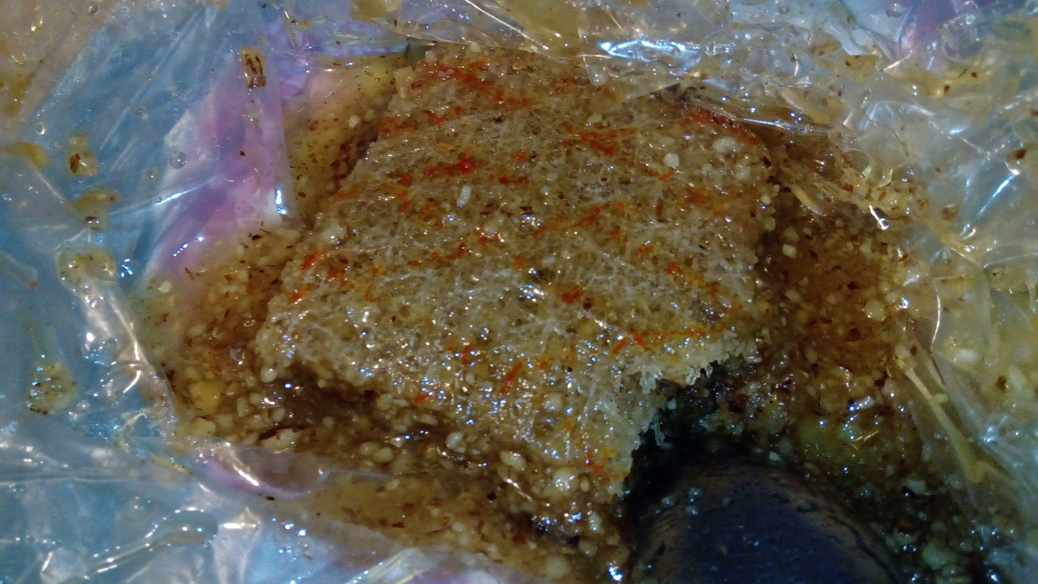 Əliəhməd Şirniyyat Evinin məhsulu - Şəki halvası